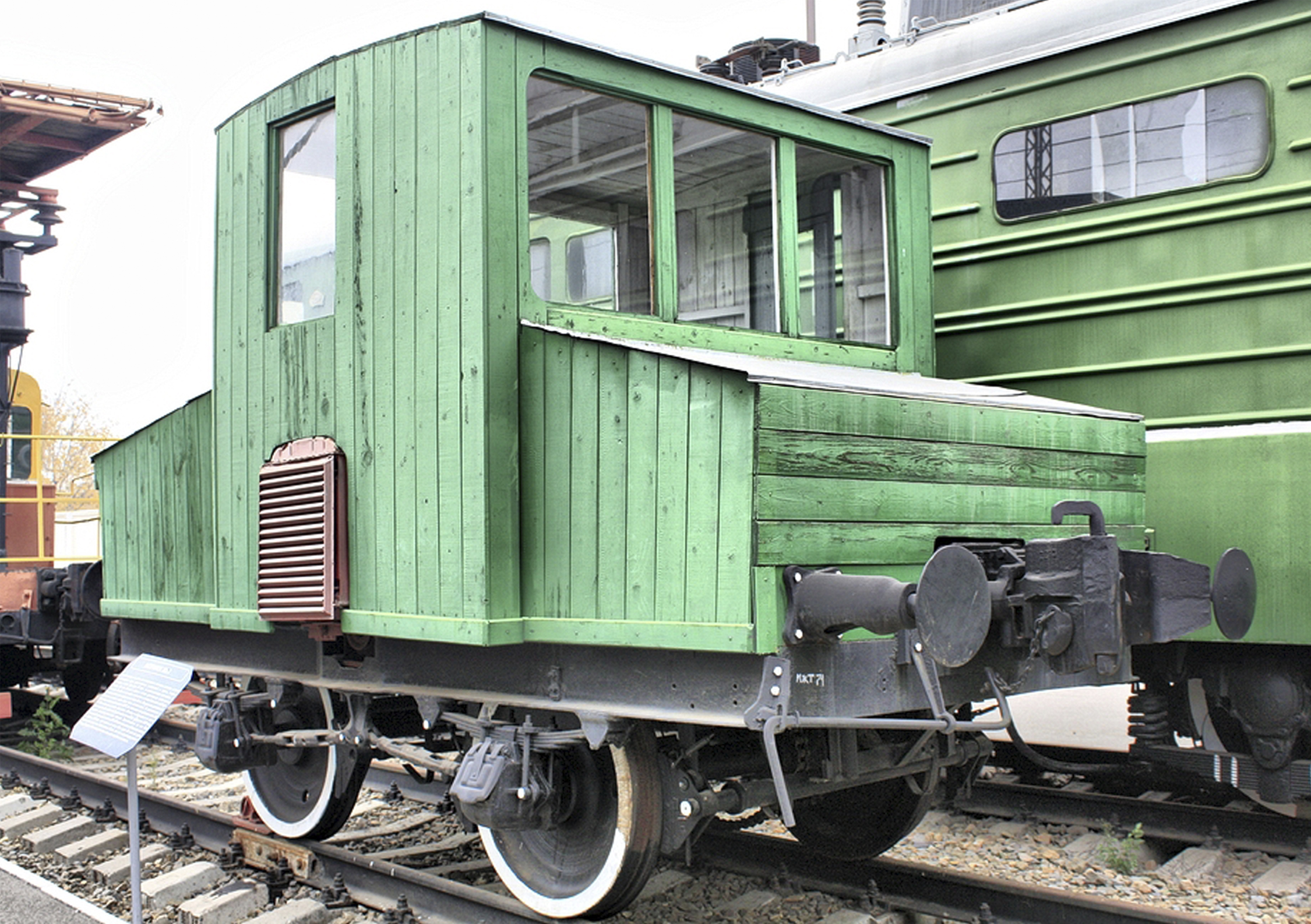 Мотовоз построен Калужским машиностроительным заводом в 1937 году